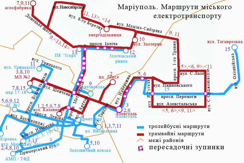 Схема електротранспорту Маріуполя